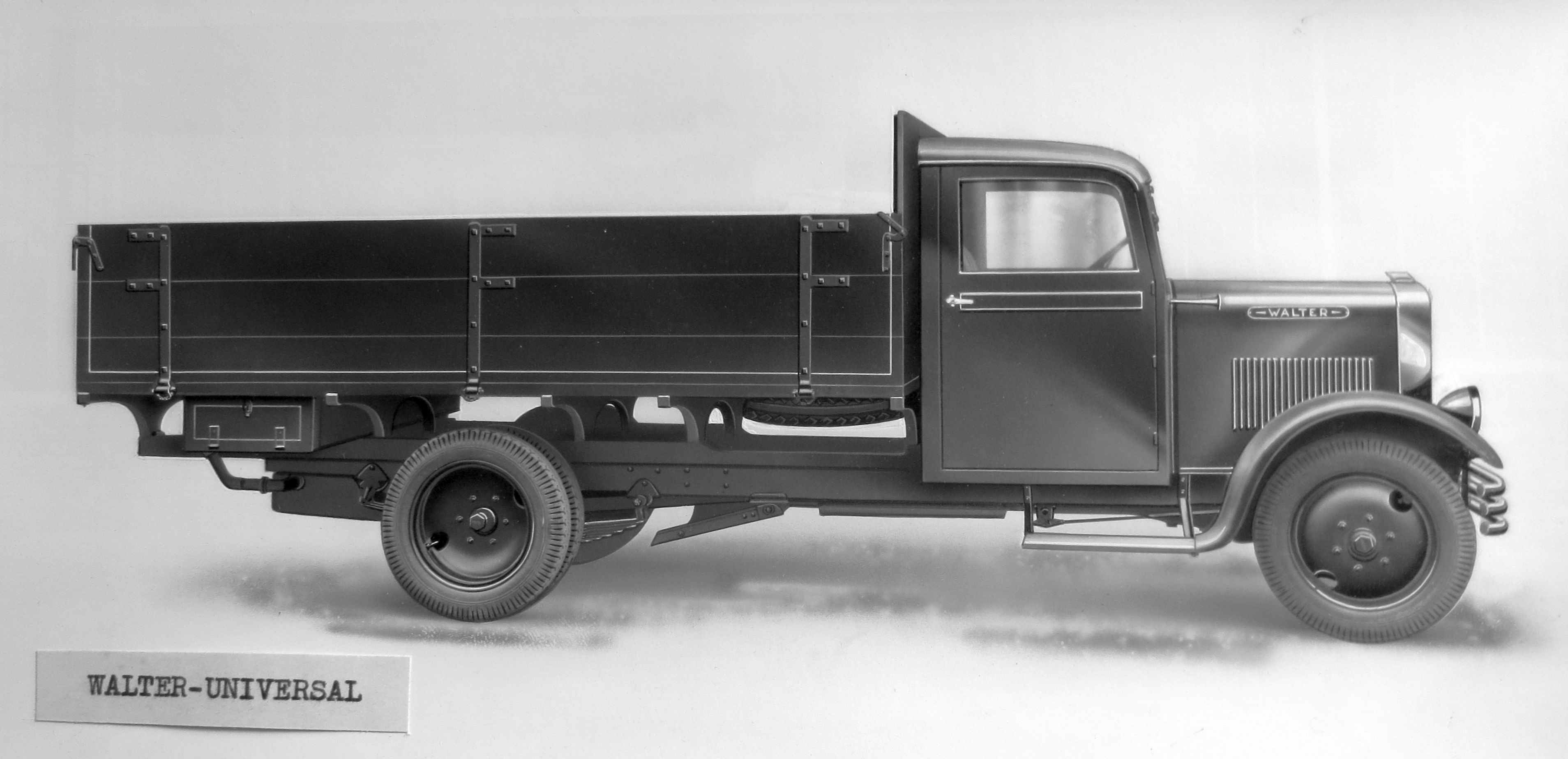 Walter Universal, valník (1935)